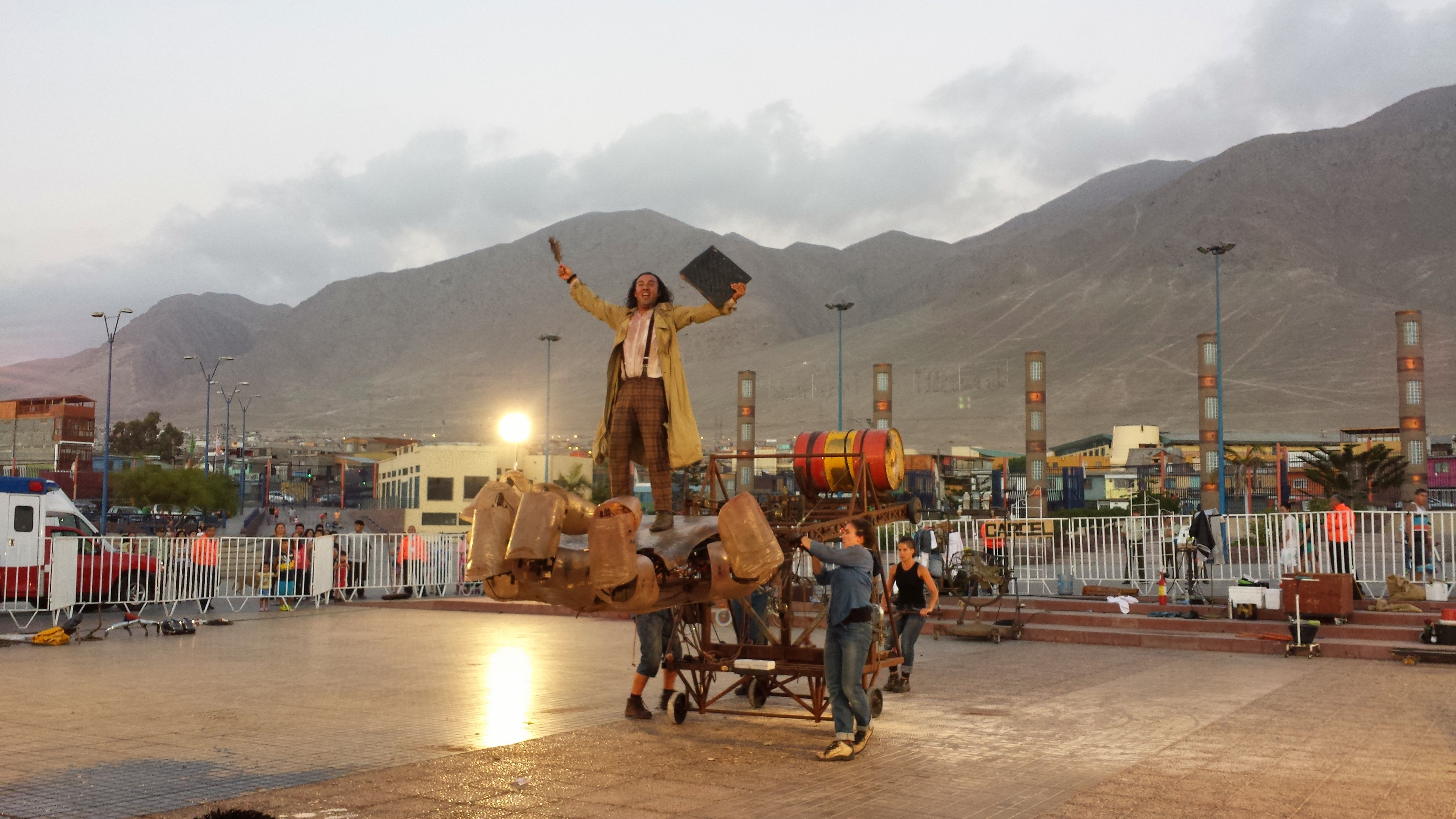 Obra de teatro callejero de la compañía chilena la Gran Reyneta.